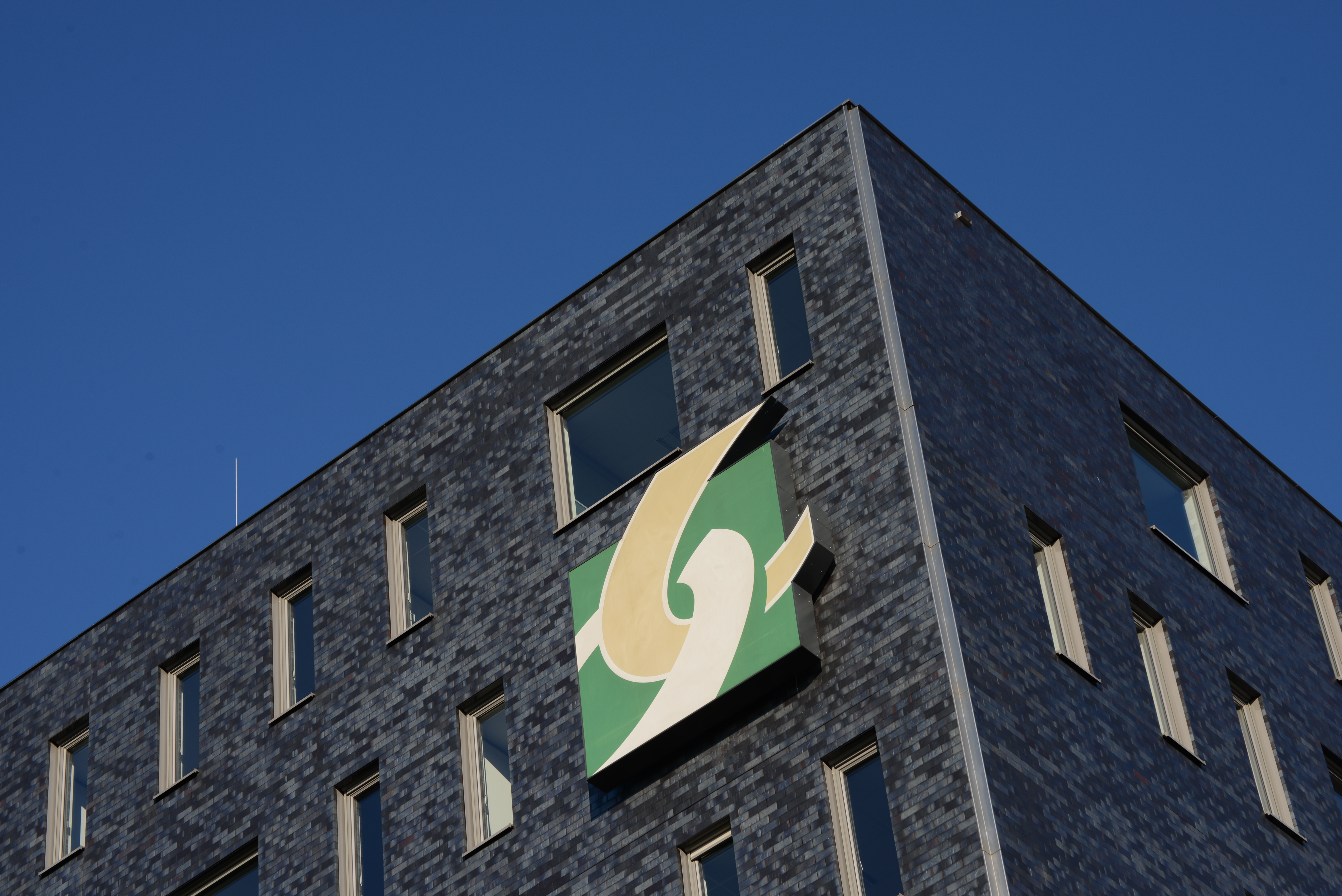 Logo van Agrifirm op het kantoorgebouw van Agrifirm Exlan aan de Poort van Veghel